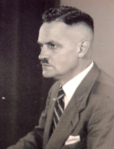 Porträtfotografie von Dr. iur. Walter Lange nach der Heimkehr aus der sowjetischen Kriegsgefangenschaft